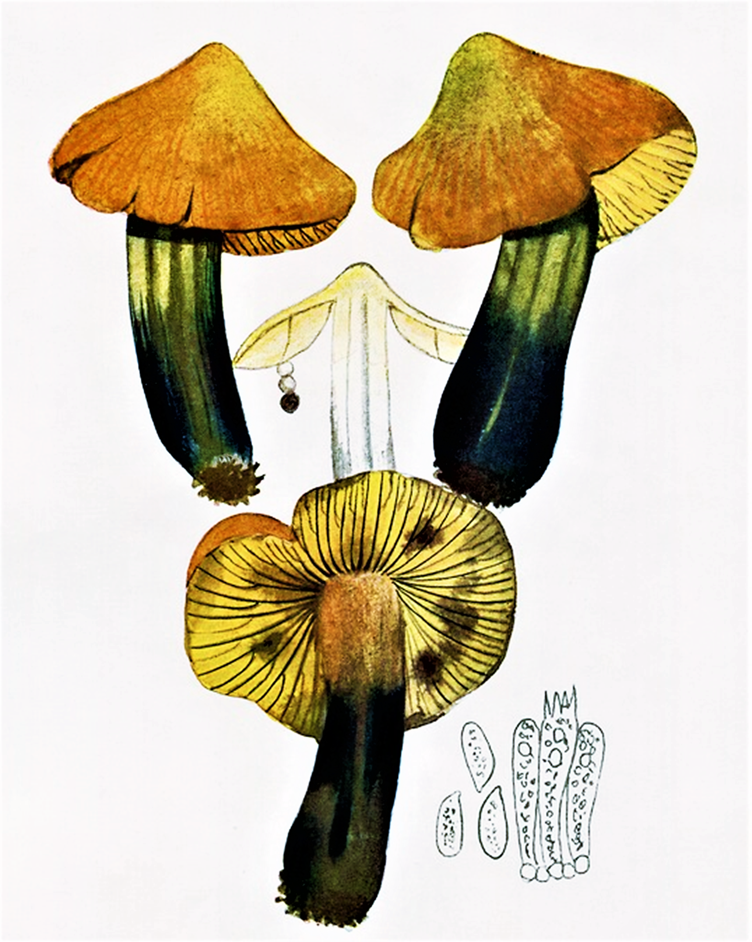 Giacomo Bresadola: Hygrophorus nigrescens Quél. (1888) heute Hygrocybe nigrescens (Quél.) Kühner (1926)